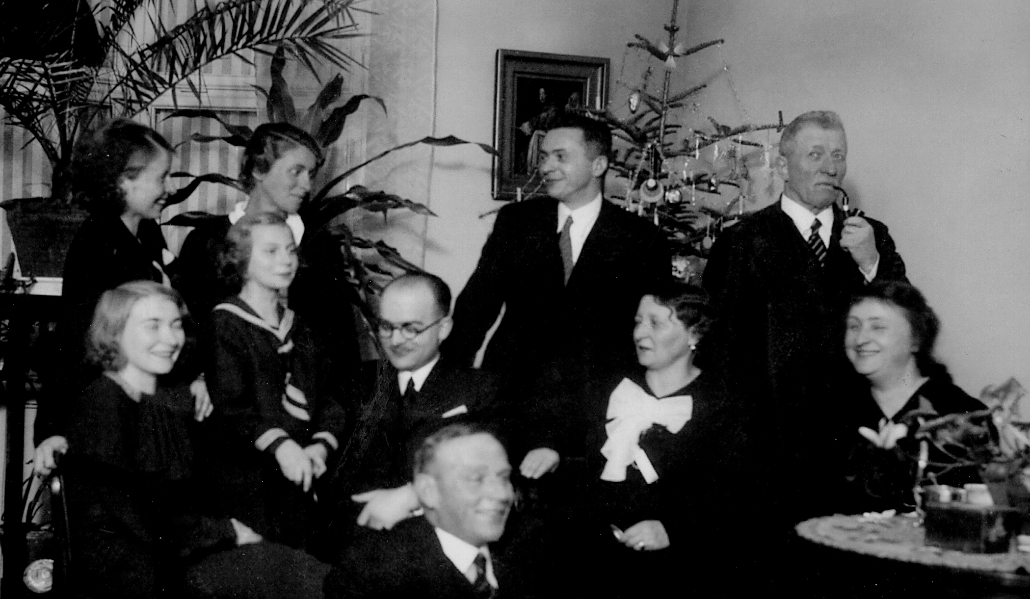 Wigilia 1935 u generała Franciszka Xawerego Latinika, Kraków, ul. Pędzichów. Od lewej: Irena z Latiników Vetulani (1904–1974), córka Generała, biolog, dr filozofii, asystent UJ (za miesiąc – 21 stycznia 1936 – powije Jerzego Vetulaniego, wnuka Generała); Antonina z Latiników Riegerowa (1906–1989), córka Generała, mgr wf i geografii, pierwsza mistrzyni Polski we florecie (1928), pracownica Sądu Metropolitalnego w Krakowie, odznaczona krzyżem Pro Ecclesia et Pontifice; Anna z Latiników Popielowa, córka Generała (1902–1969), pracownica Sądu Metropolitalnego w Krakowie, odznaczona krzyżem Pro Ecclesia et Pontifice (za miesiąc - 24 stycznia 1936 – powije Andrzeja Popiela, wnuka Generała); Irena Popielówna (1925–1990), wnuczka Generała, zakonnica klauzurowa benedyktynka-sakramentka, w latach 1962–1971 i 1977–1989 przeorysza klasztoru SS. Sakramentek na Nowym Mieście w Warszawie; Andrzej Rieger (1906–1940), zięć Generała, mąż Antoniny, prokurator, ppor rezerwy, zamordowany w Katyniu; Kazimierz Sulima-Popiel (1898–1957), zięć Generała, mąż Anny, inżynier-naftowiec (wiertnik), kpt. w armii Generała Andersa, odznaczony Krzyżem Walecznych; Adam Vetulani (1901–1976), zięć Generała, mąż Ireny, profesor wydziału Prawa UJ, dr hc uniwersytetów w Strassburgu i Nancy, sierżant pchr. w II DSP generała Prugara-Ketlinga, Sekretarz Generalny PAU (1957–1958), odznaczony Krzyżem Walecznych, Croix de Guerre avec etoile, orderem Pio Nono; Helena ze Stiasny-Strzelbickich Latinik (1876–1956), żona Generała, odznaczona medalem walki za Śląsk Cieszyński; Franciszek Xawery Latinik (1864–1949), generał dywizji WP, obrońca Śląska Cieszyńskiego, dowódca I Armii WP i gubernator Warszawy w czasie wojny bolszewickiej, członek pierwszej kapituły orderu Virtuti Militari; Ewa Ekielska, siostrzenica i podopieczna Heleny Latinik.